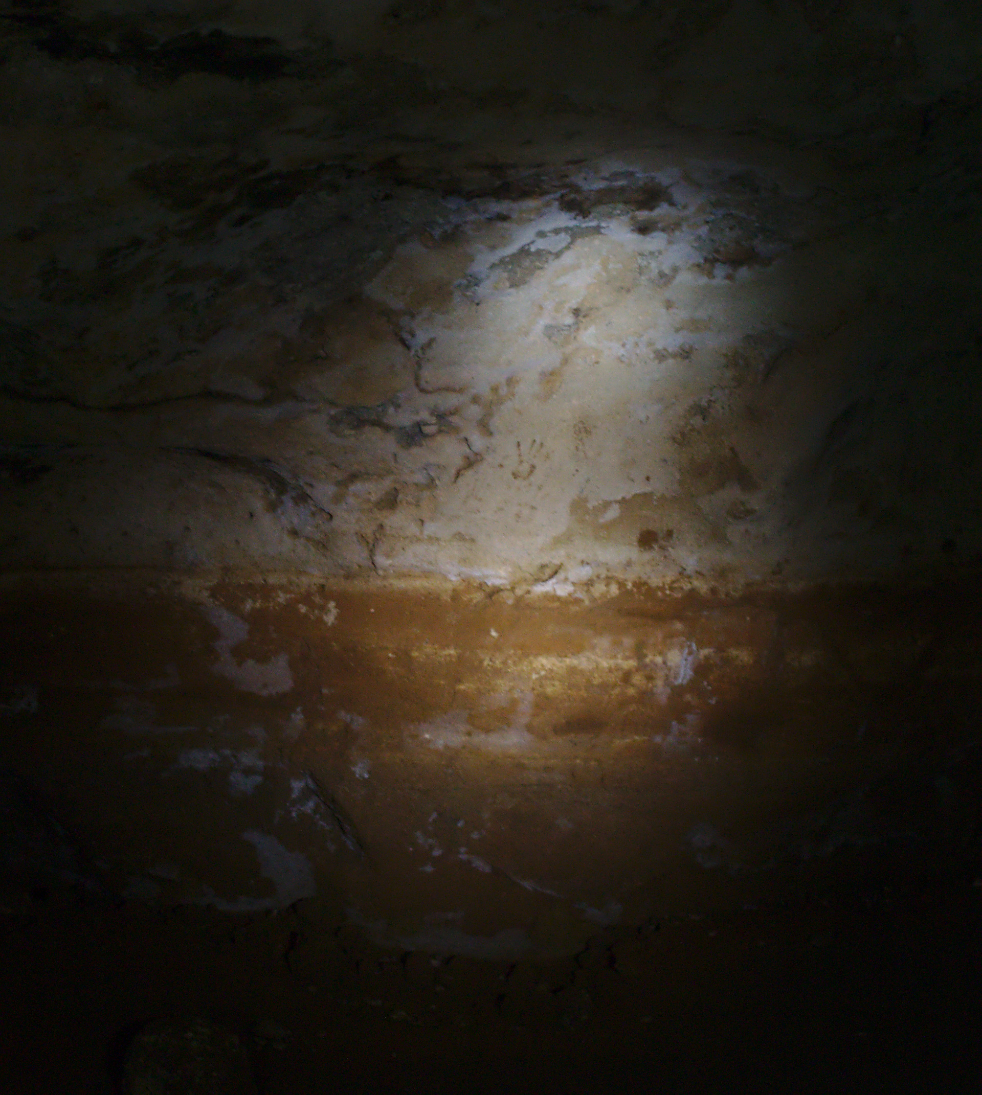 Handabdrücke in der Loltún Höhle